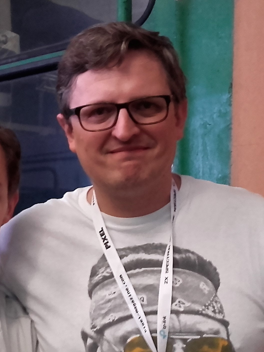 Aleksy Uchański podczas Pixel Heaven 2017, 26 maja 2017 roku, Warszawa.